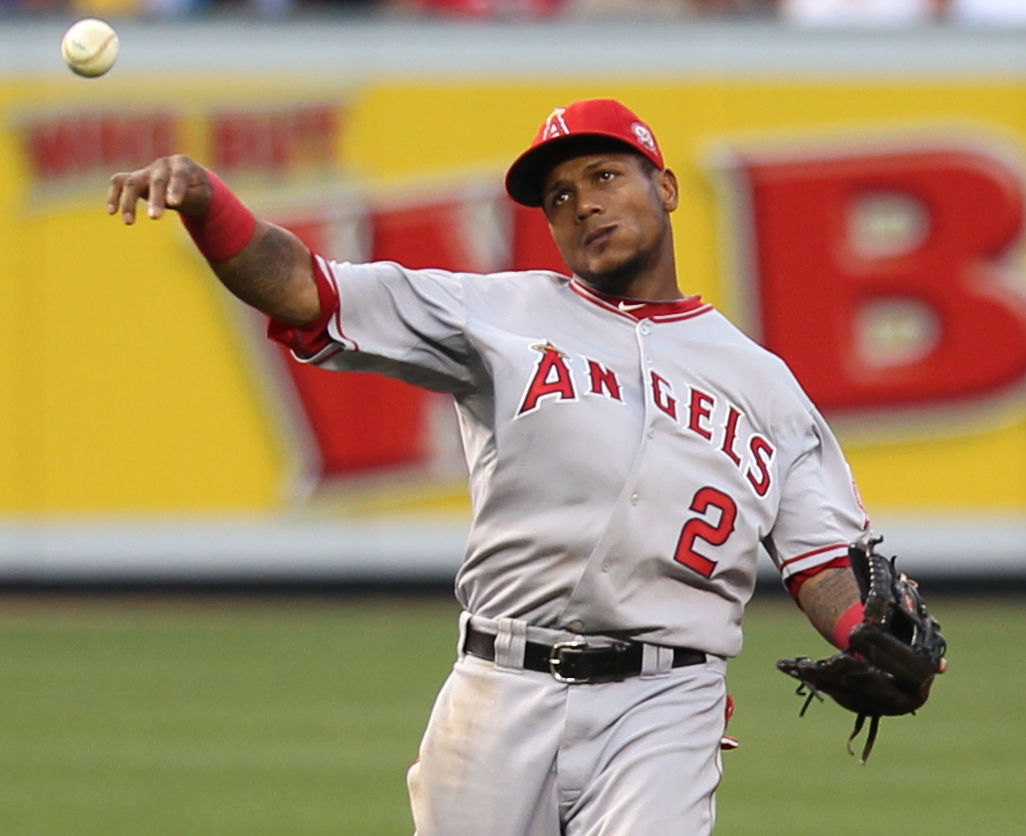 Erick Aybar